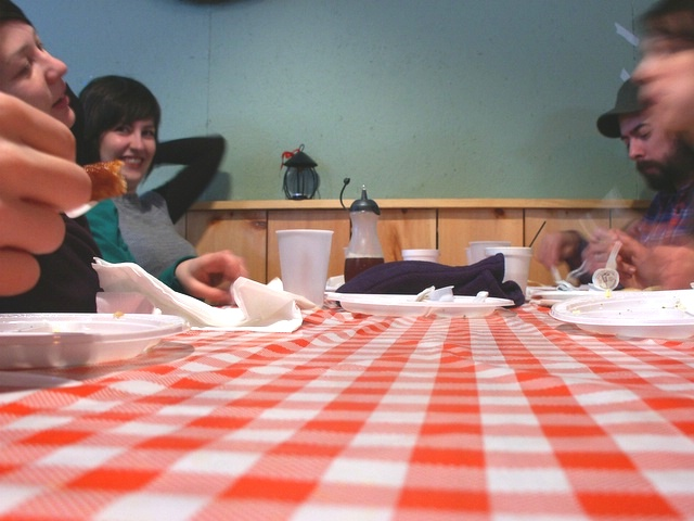 Punavalkoruudullinen pöytäliina.